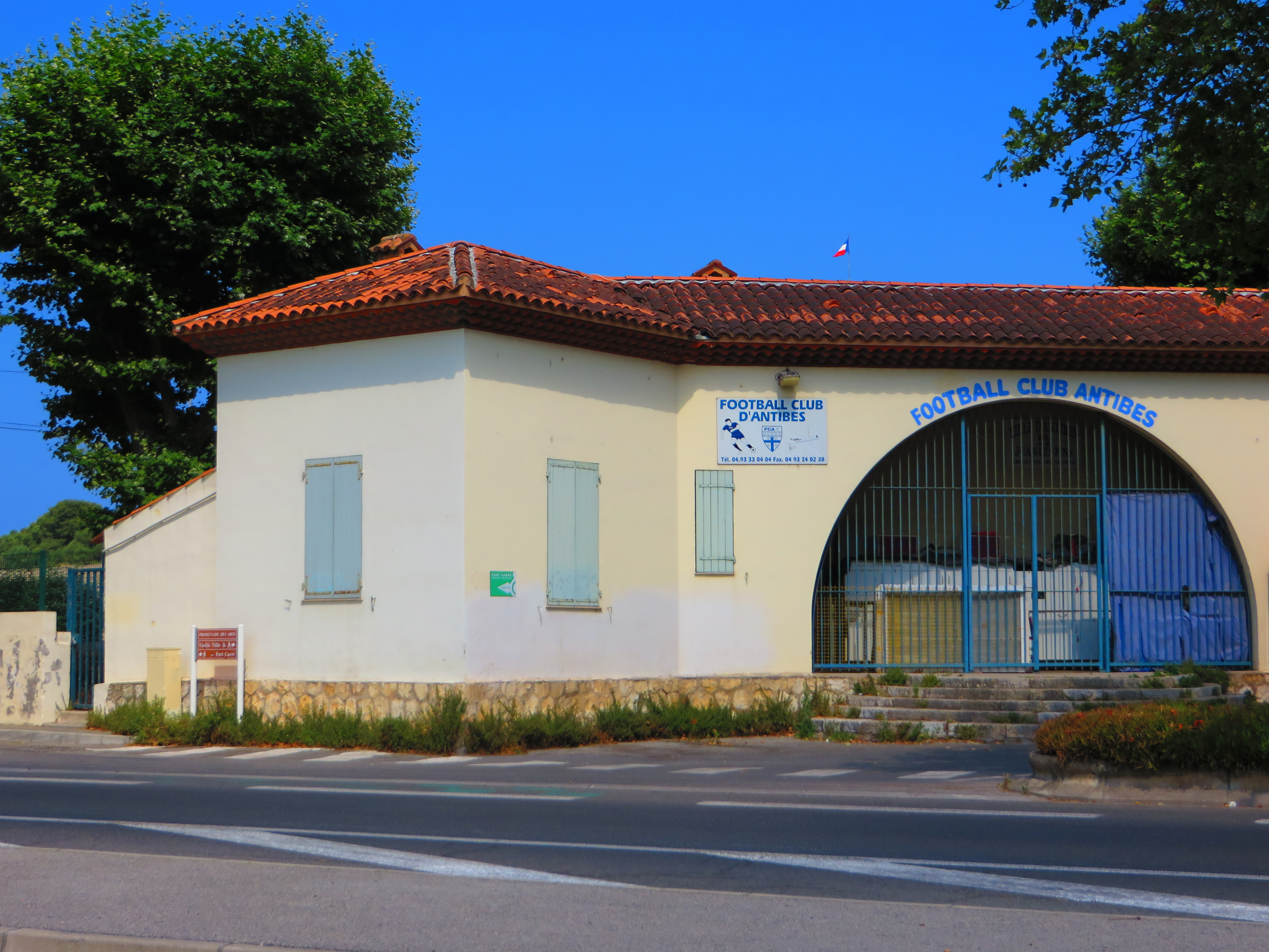 Antibes Football Club